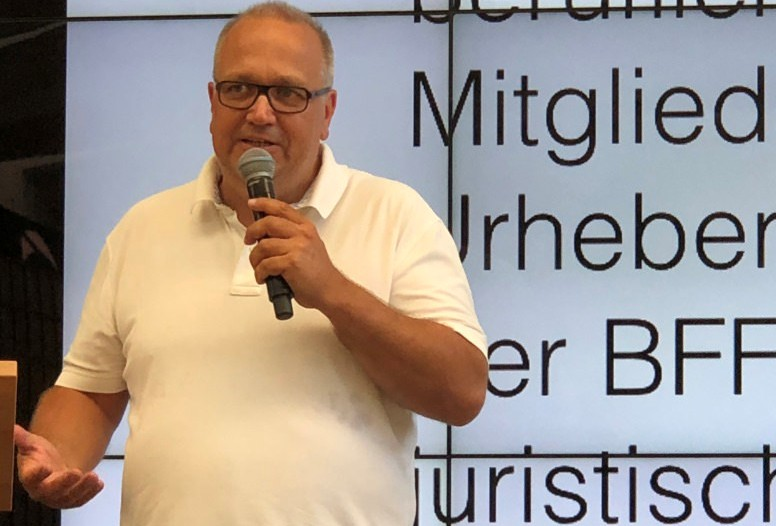 Vortrag des BFF Vorstandes und Fotografen Klaus Mellenthin auf dem Fotofestival Zingst 2018